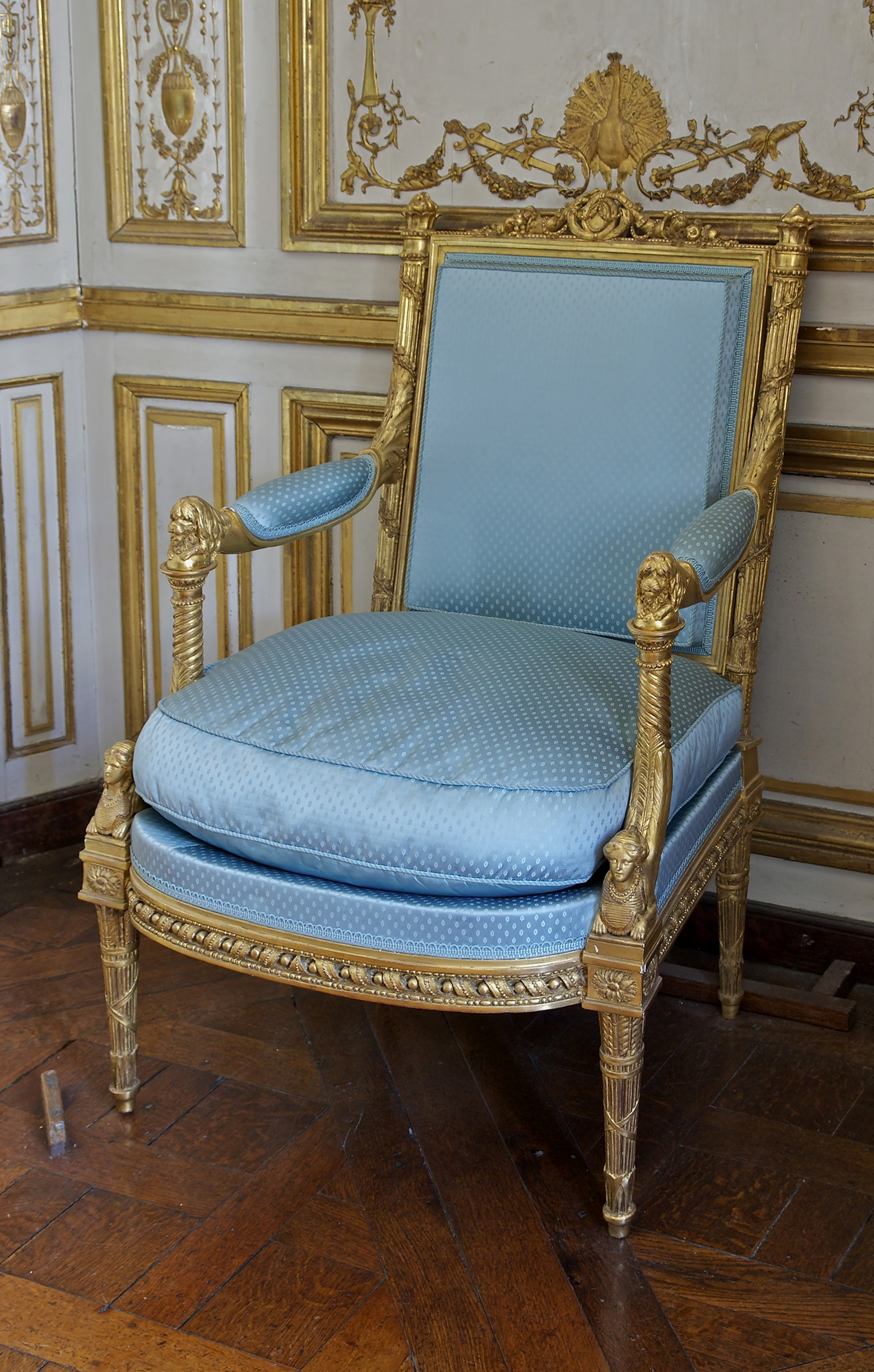 Un des fauteuils « à la reine » (d'une paire), livrés en 1781. Restitution (1981) de l'étoffe originelle : une grenadine bleue, soierie satinée à relief de points, retissée d'après le modèle original et correspondant au premier état livré en 1781, que Marie-Antoinette fit par la suite remplacer.